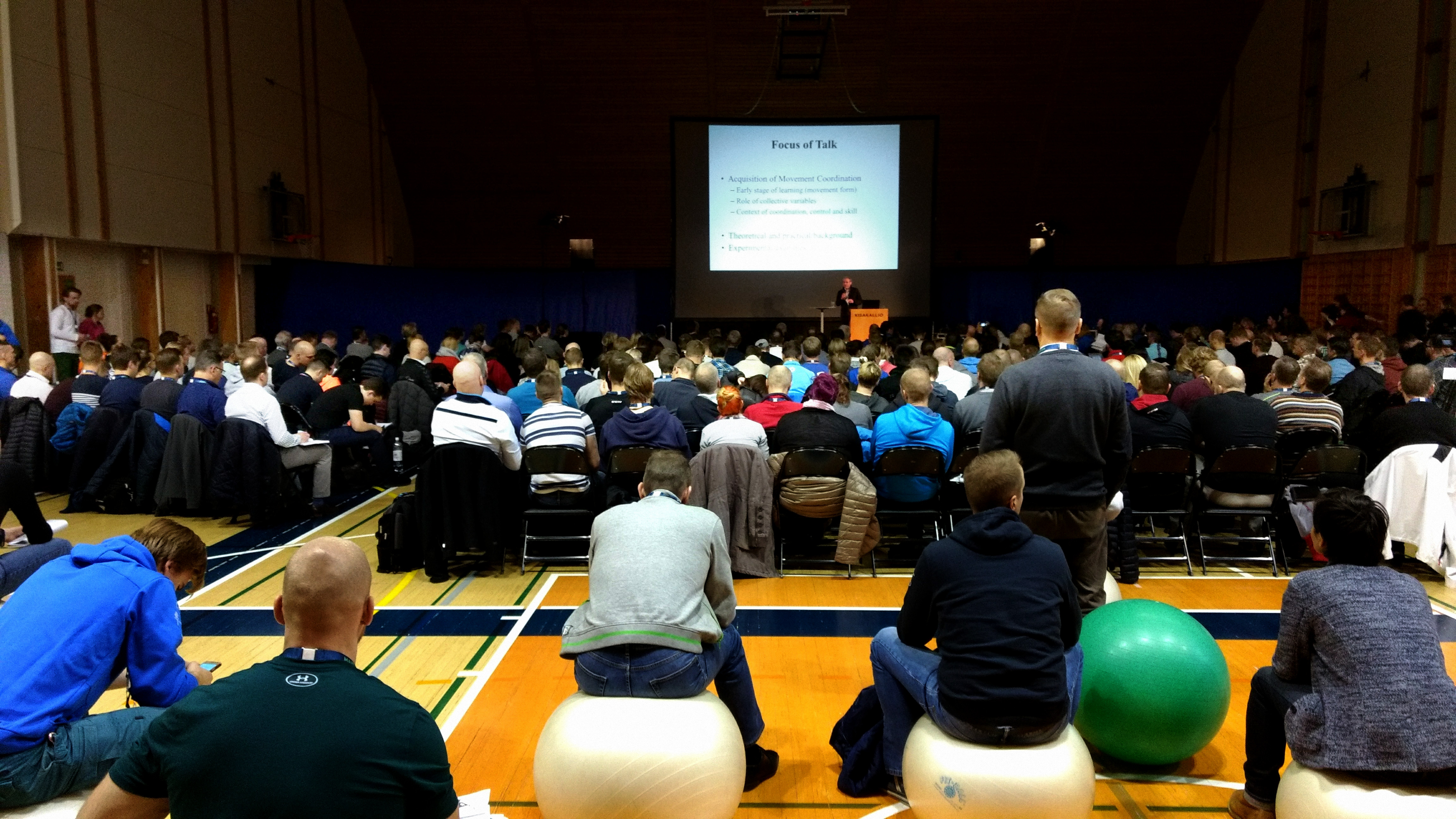 Kisakallio 15.11.2017